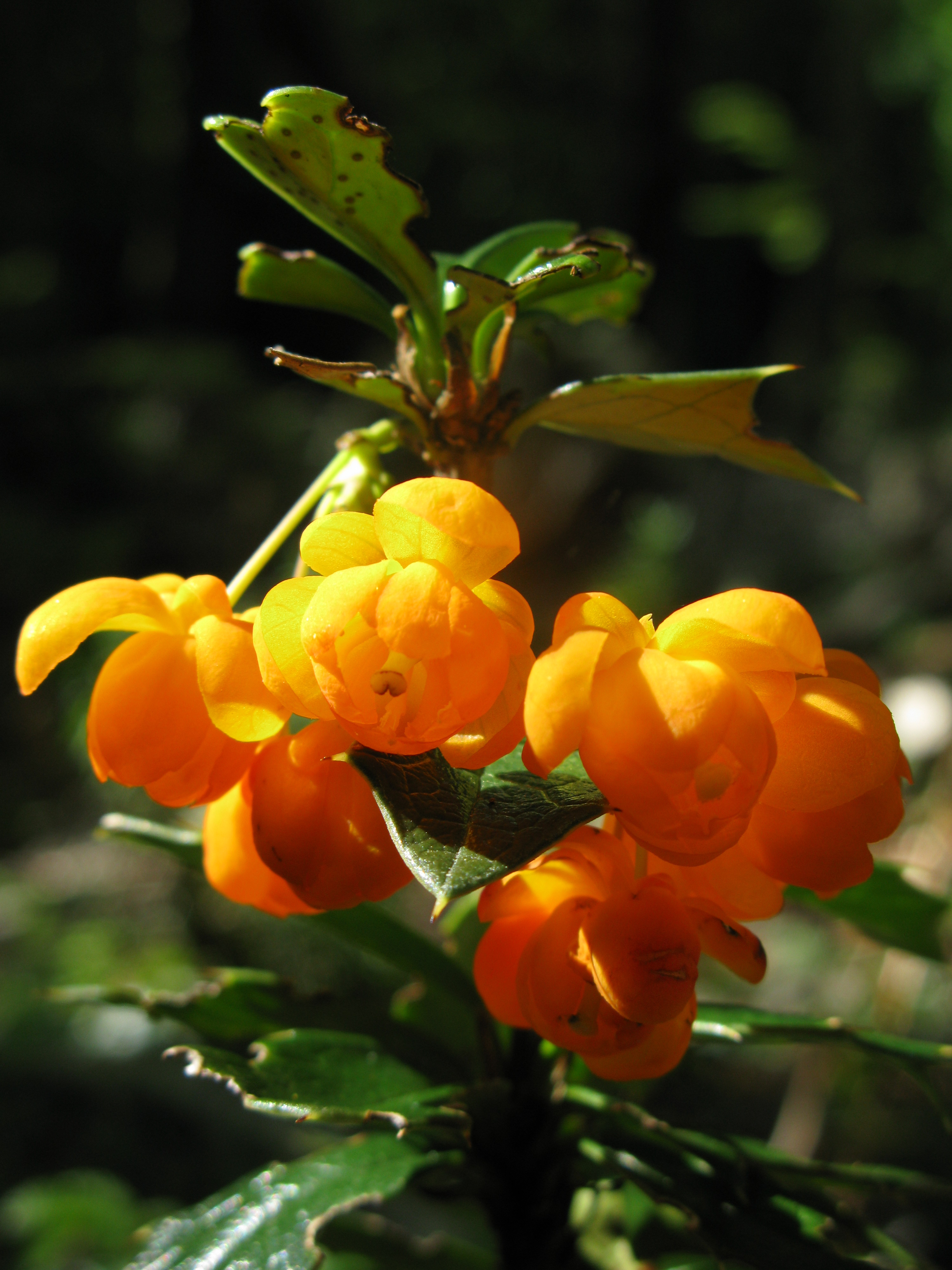 Michay ou techelia (Berberis ilicifolia) - Parc national de la Terre de Feu - Argentine